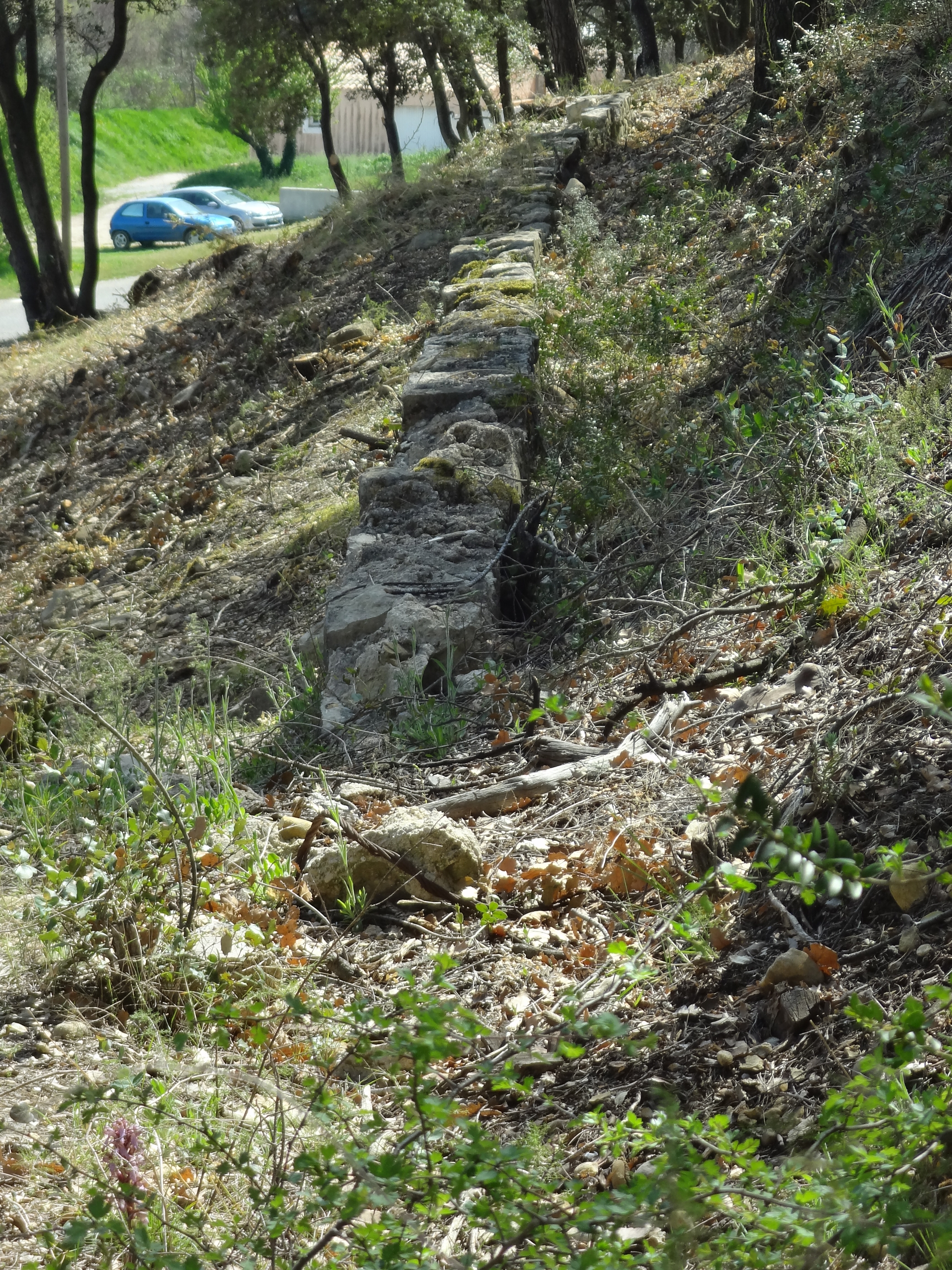 Un des éléments encore visible de l’affaire Dominici (août 1952) : des vestiges du canal d’irrigation non-fermé le soir du 4 août